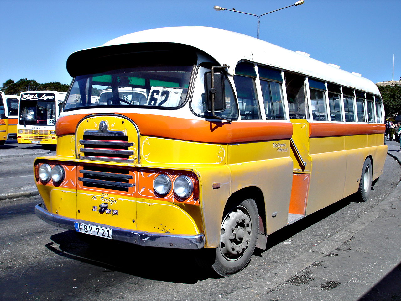 Bus op Malta